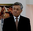 АРКАИМ, ЧЕЛЯБИНСКАЯ ОБЛАСТЬ. С губернатором Челябинской области Петром Суминым (слева) и директором музея-заповедника «Аркаим» Геннадием Здановичем во время осмотра археологической экспозиции.